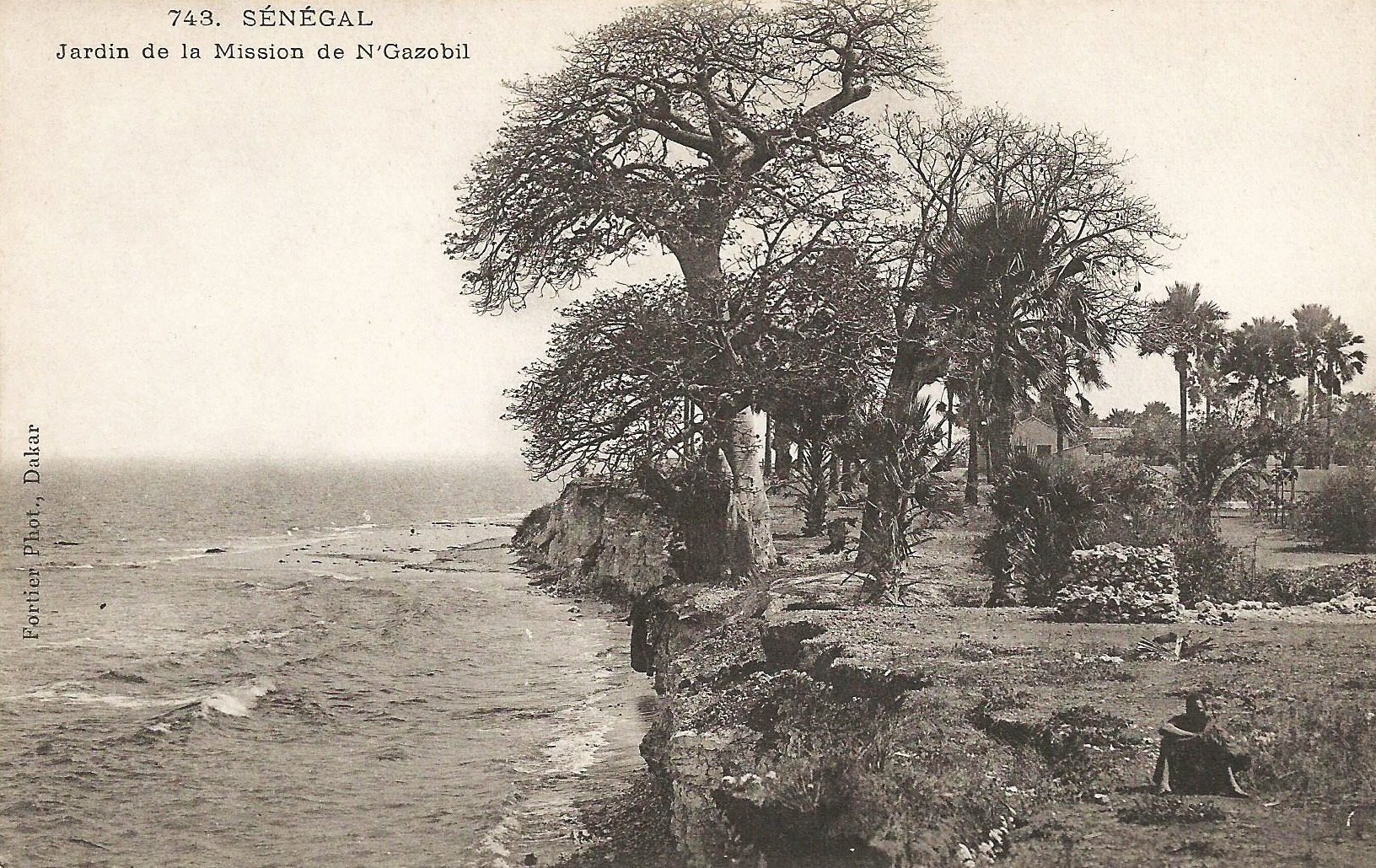 François-Edmond Fortier, Sénégal. Jardin de la mission de N'Gazobil. Afrique Occidentale - Sénégal.